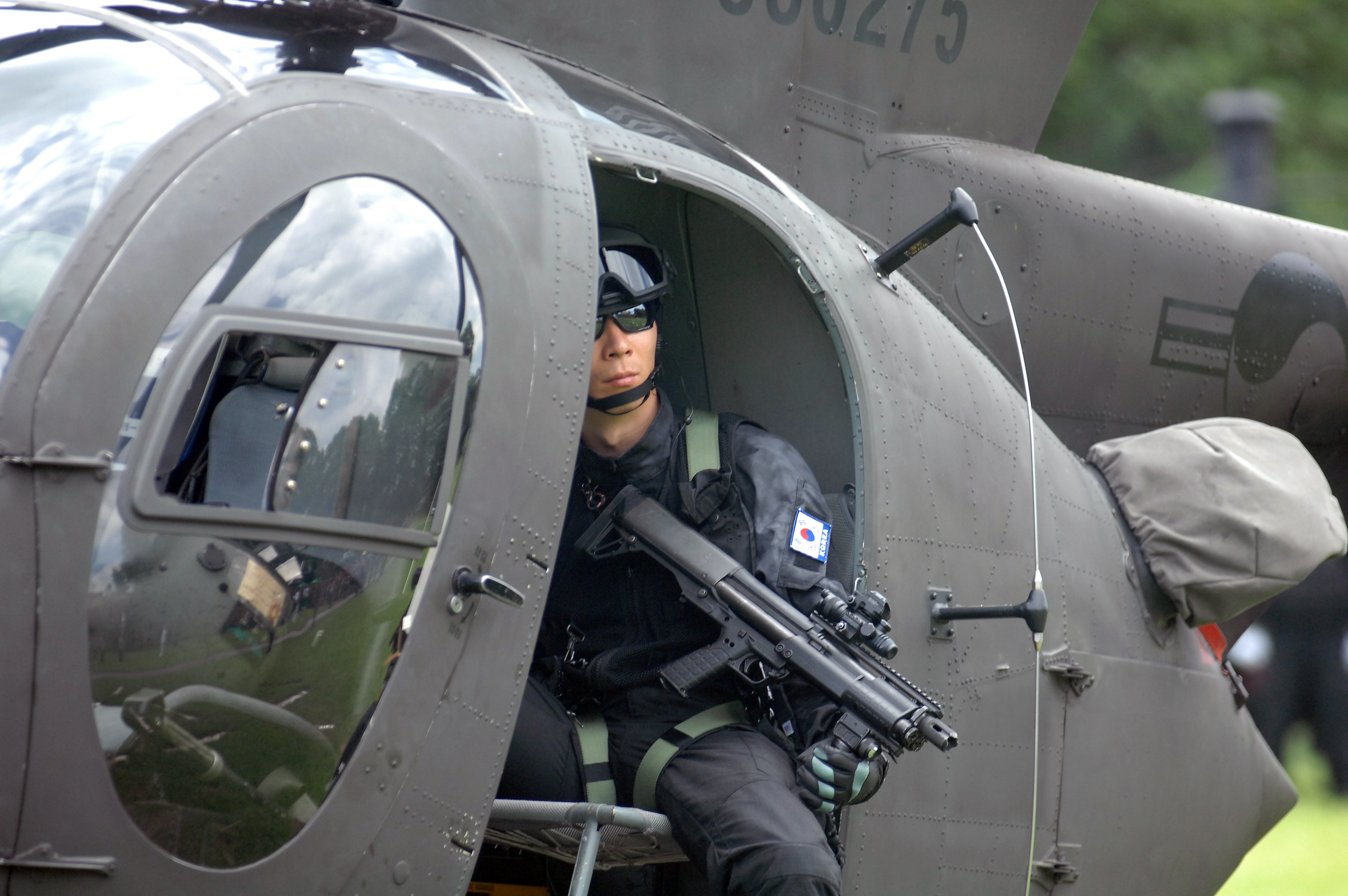 촬영 : 임영식